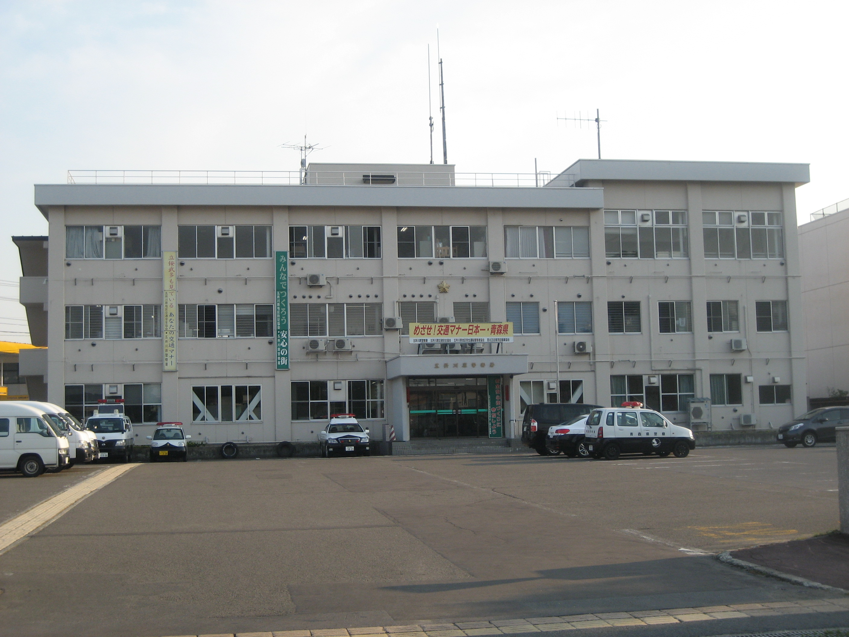 五所川原警察署庁舎